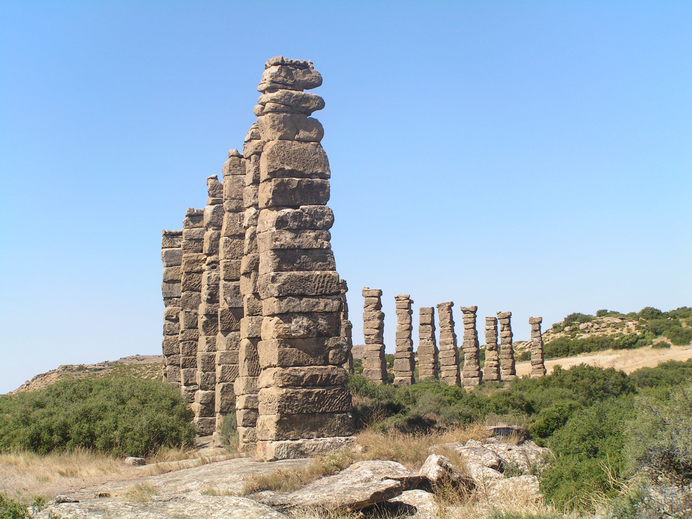 Aragonés: Pilastras d'o acueducto román d'os Bañals d'Uncastiello (Zinco Billas, Aragón), ta portar l'augua dende o río Arba de Luesia, en a Fuen d'o Diaple, sota Malpica d'Arba.